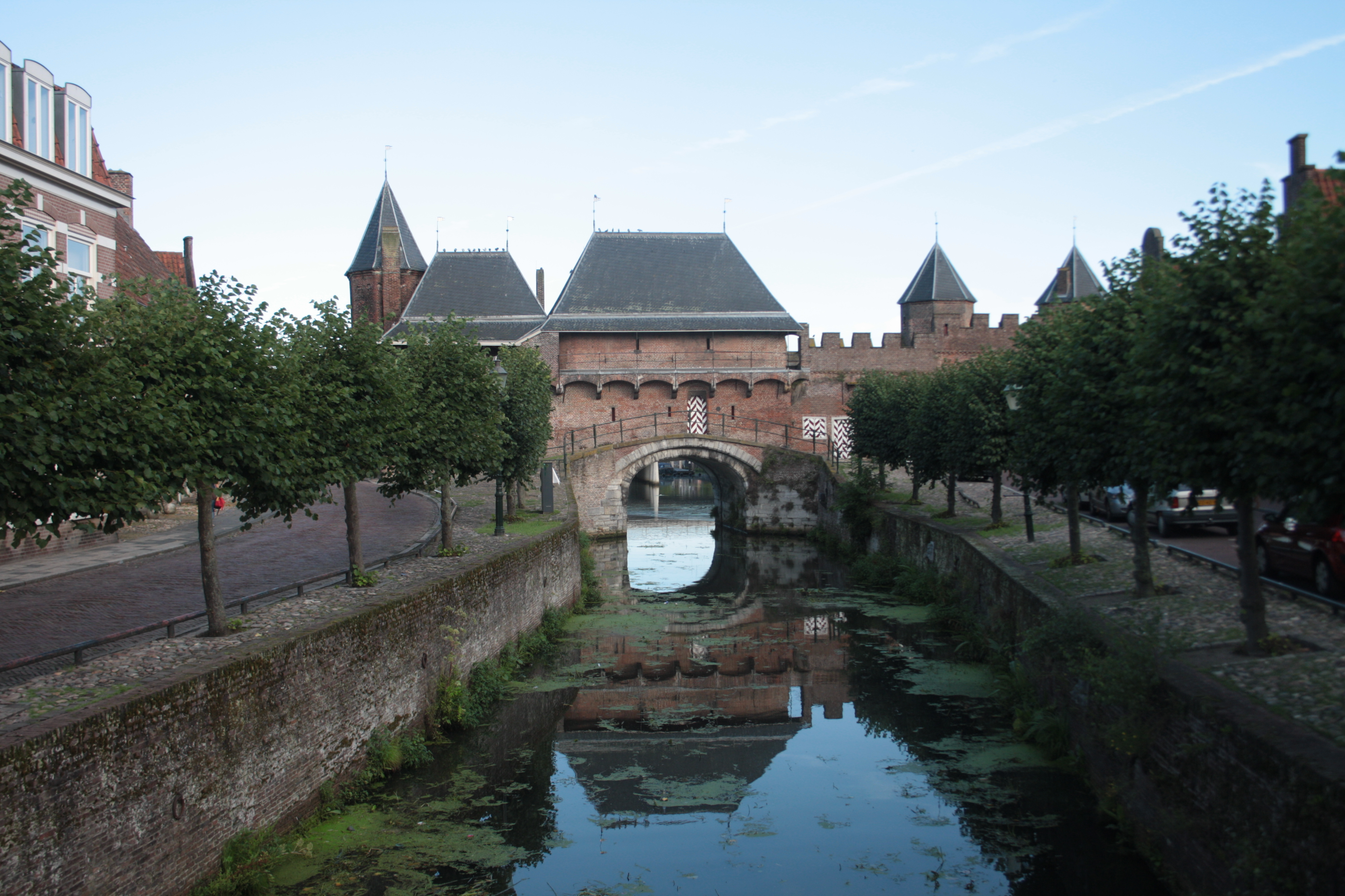 De Koppelpoort is een stadspoort in Amersfoort. Het is een combinatie van een land- en waterpoort.